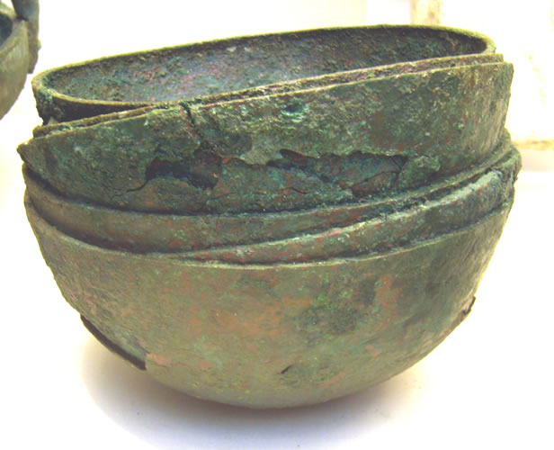 bronze bowls, Cyrus, Late Bronze Age (Britisch Museum)